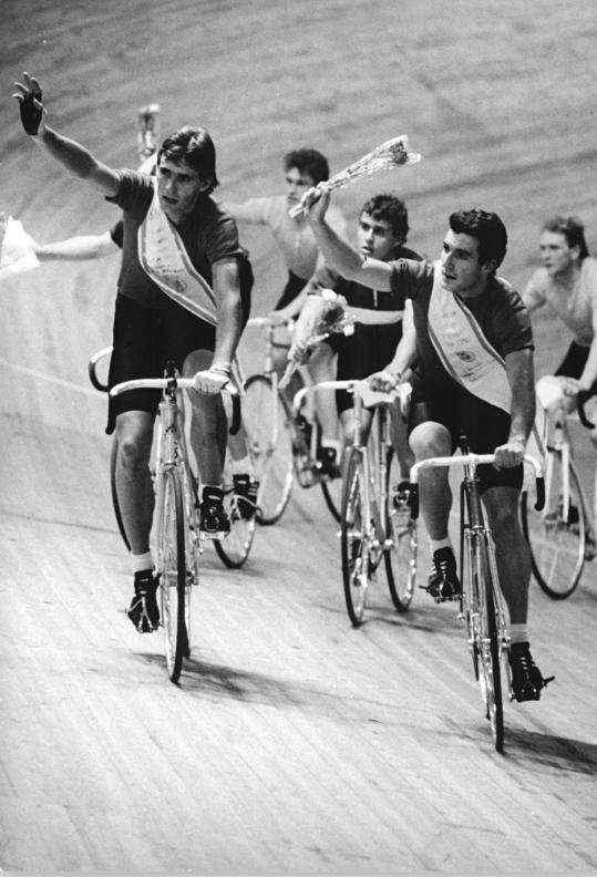 Steffen Rein, Bert Dietz ADN-ZB Oberst 22.12.88 Berlin: Winterbahn Die Leipziger DHfK-Sportler Bert Dietz (rechts) und Steffen Rein (links) gewannen am 21.12.88 auf der Winterbahn in der Werner-Seelenbinder-Halle die Zweier-Mannschaftsmeisterschaft von Berlin. Mit drei Runden Vorsprung beendeten sie das dramatische 100-Minuten-Rennen mit gefahreren 81,436 km. Von den 15 Paaren schieden sechs vorzeitig aus. Abgebildete Personen: Dietz, Bert: Radsportler, SC Deutsche Hochschule für Körperkultur und Sport (DHfK) Leipzig, Friedensfahrt 1990, DDR Rein, Steffen: Radsportler, Friedensfahrtteilnehmer 1989 und 1990, DDR